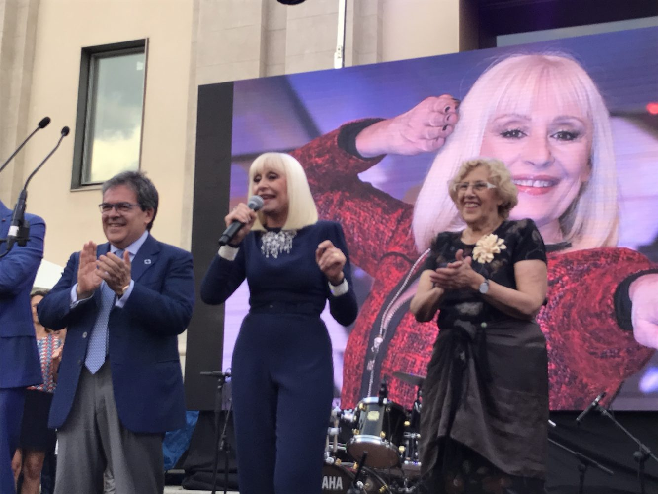 Dos países unidos por muchos rasgos comunes, Italia y España. Por primera vez, la Fiesta de la República, día nacional en Italia, se abre a todos los madrileños con una celebración que ha arrancado la tarde del 2 de junio y concluirá el domingo 4 de junio. Manuela Carmena, alcaldesa de Madrid, y Stefano Sannino, embajador del país casi vecino, acudieron este viernes al patio central del Conde Duque, reconvertido en una auténtica piazza italiana, para adentrarse en la cultura, la música, la gastronomía y el diseño, uno de los puntos fuertes italianos y que sirve de hilo conductor al programa del fin de semana, y también de nexo entre los diseñadores italianos y madrileños.